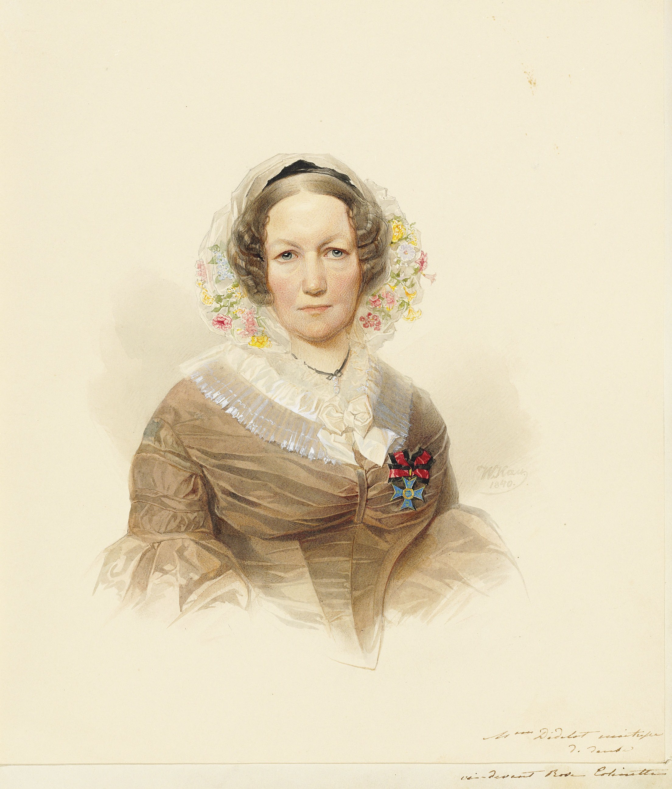 Мария-Роза Дидло, ур. Колинетт (1784—1843), балерина, жена знаменитого балетмейстера. В 1818 году оставила сцену, в Петербурге была первой учительницею бальных танцев, обучала великих княжон и преподавала в Смольном институте. В 1828 году за долговременную усердную службу была награждена Мариинским знаком отличия 2 степени, а в 1841 году 1 степени.